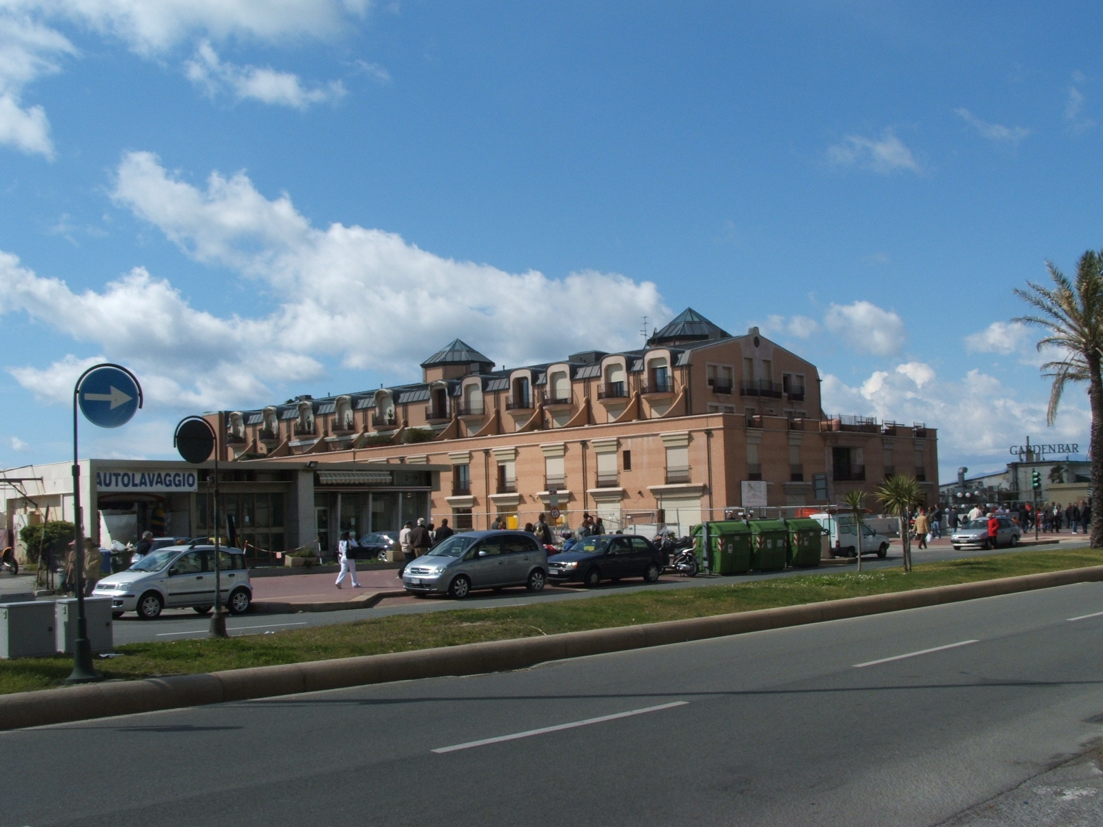 Immagine da Genova - Corso Italia - Boccadasse